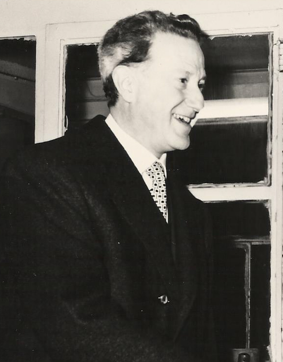 Attilio Prevost Jr. nel marzo del 1958